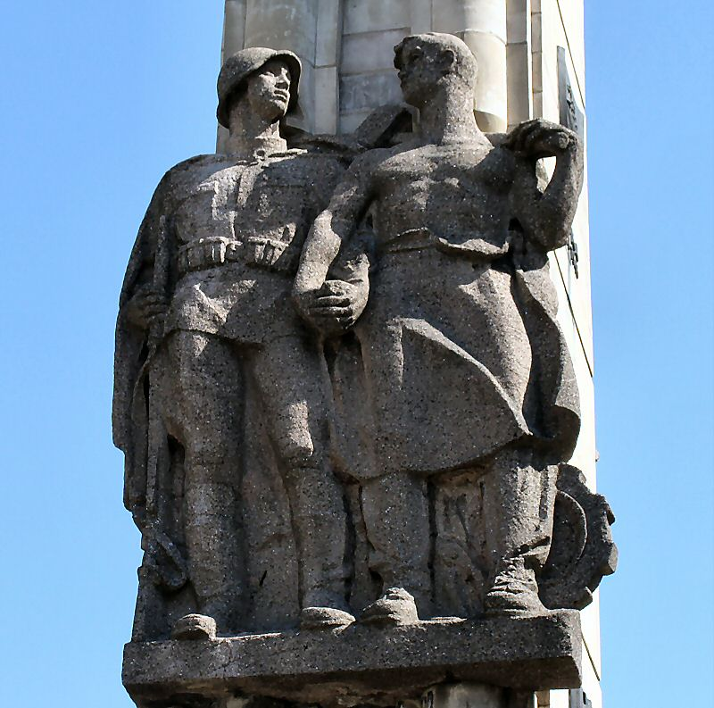 Pomnik Wdzięczności dla Armii Radzieckiej w Szczecinie - fragment